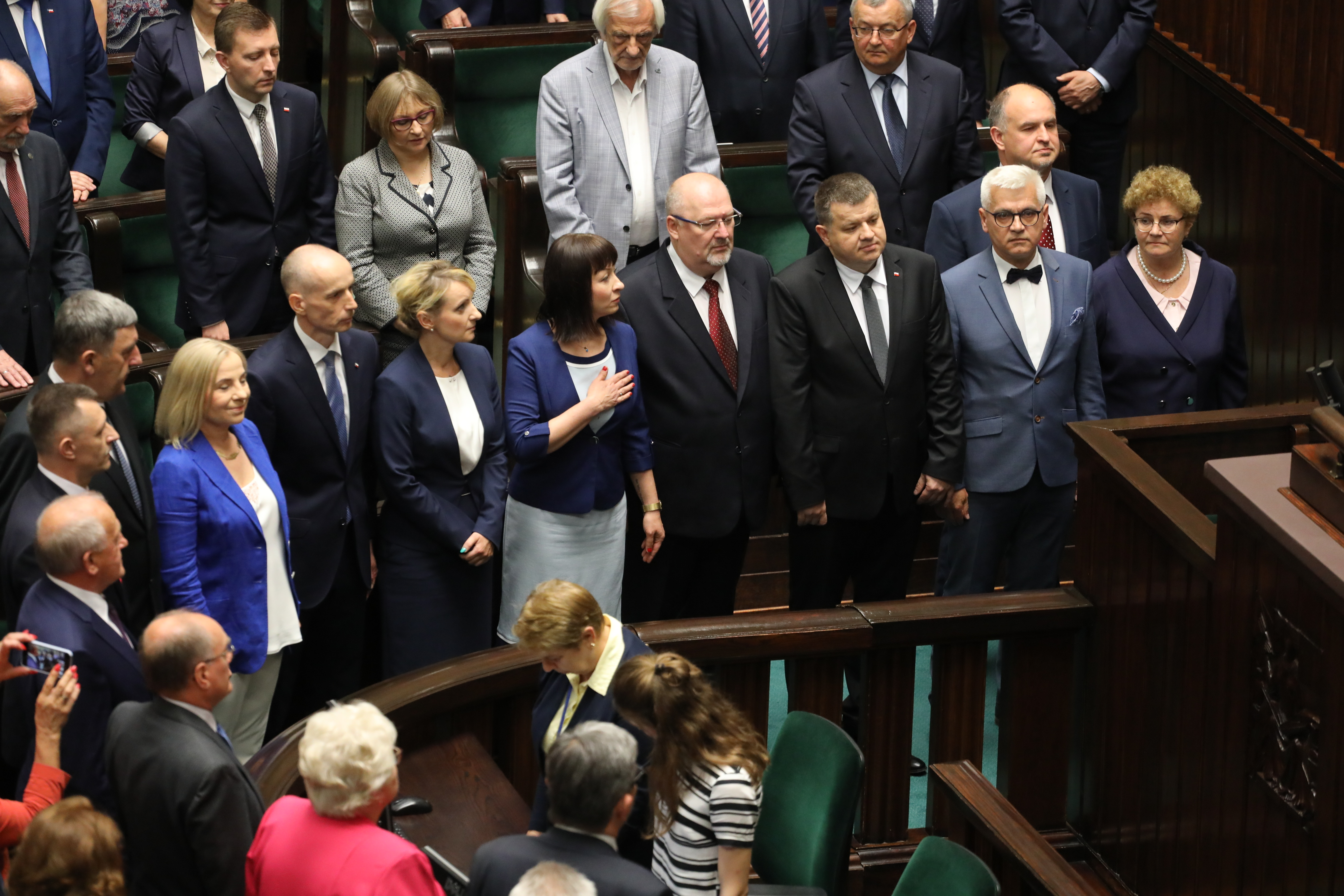 Nowi posłowie VIII kadencji (2019), m.in. od lewej: Rafał Mucha, Agnieszka Soin, Katarzyna Dutkiewicz, Krzysztof Ciebiada, Krzysztof Kozik, Henryk Wnorowski.